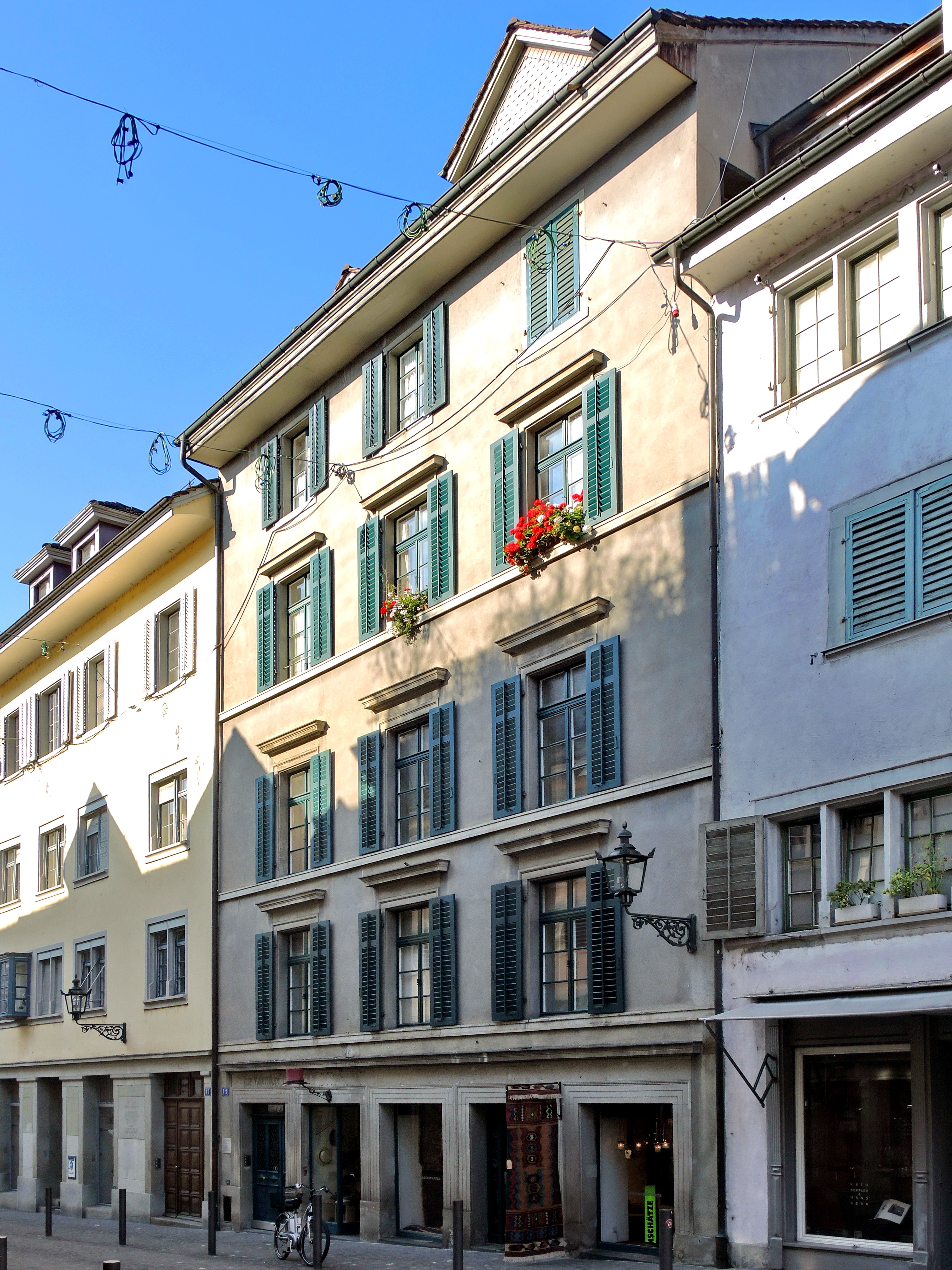 Katharina von Zimmern (1478-1547) : Haus «zum Mohrenkopf», Neumarkt 13 in Zürich (Switzerland)